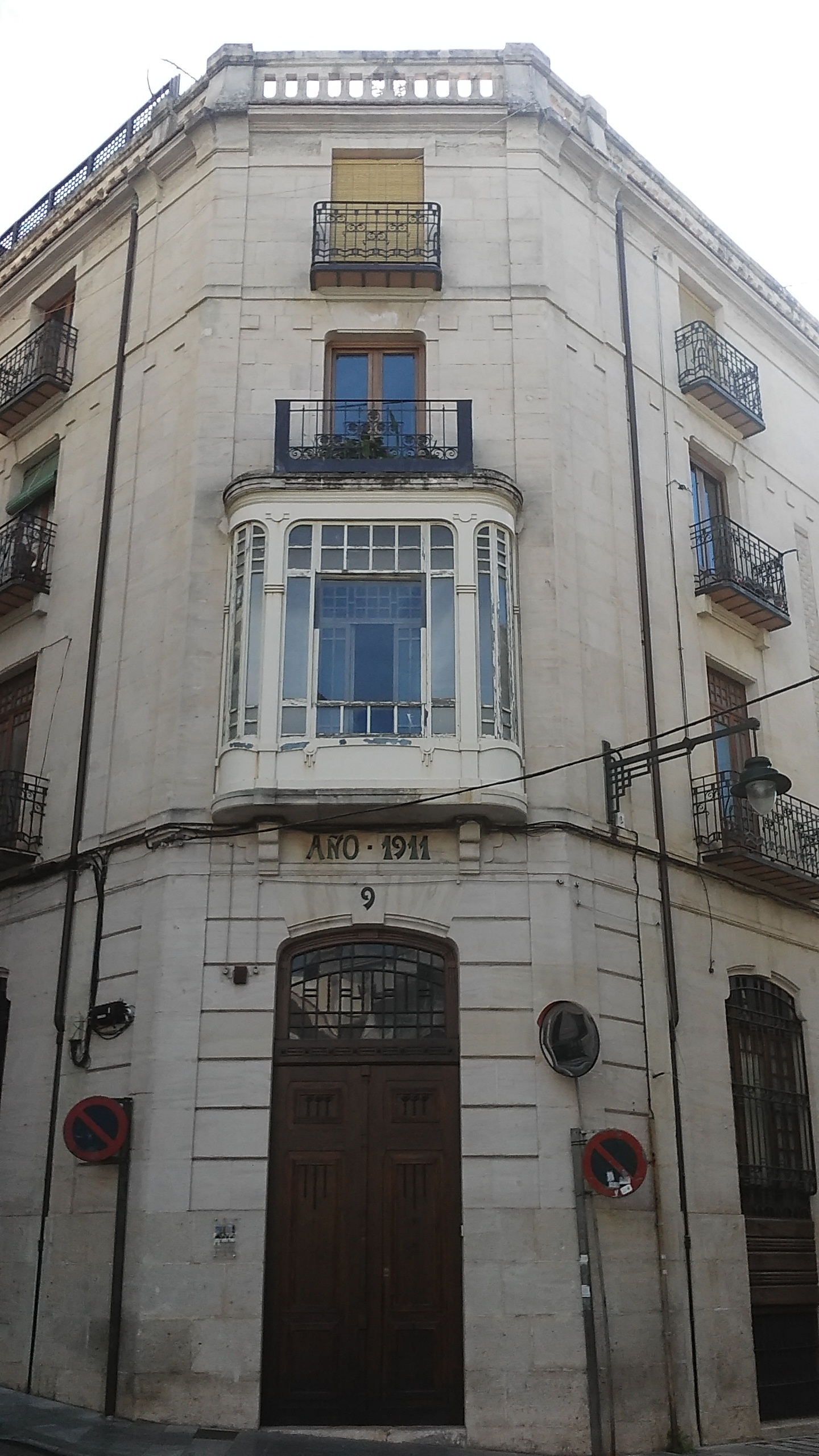 Edifici moderniste en Alcoy (Alacant). Obra de l'arquitecte Timoteu Briet Montaud).